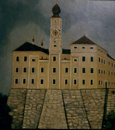 Schloss Helfenberg bei Velburg in der Oberpfalz. Ausschnitt aus einem Altarbild von Georg Asam in der Pfarrkirche von Lengenfeld.